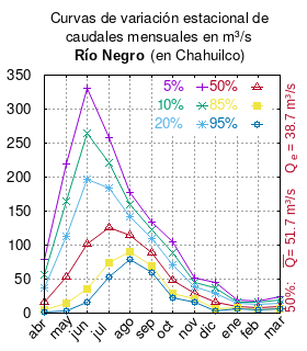 Curvas de variación estacional del río Negro en Chahuilco. # Dirección General de Aguas # Diagnóstico y clasificación de los cursos y cuerpos de agua según objetivos de calidad. Cuenca del río Bueno. # Santiago de Chile # Ministerio de Obras Públicas (Chile) # 2004 # url: # urlarchivo: # Tabla 4.8: Río Negro en Chahuilco (m3/s), pág. 53 mes 5% 10% 20% 50% 85% 95% abr 78.35 56.14 37.17 16.13 4.59 1.36 may 219.58 163.93 113.68 52.98 15.14 3.18 jun 330.14 264.76 197.46 101.91 35.25 15.90 jul 258.16 221.49 183.21 125.32 74.84 53.06 ago 176.94 159.53 141.39 113.98 89.64 78.59 sep 133.65 122.16 109.55 88.96 68.84 59.21 oct 104.59 88.05 71.47 47.97 29.36 22.00 nov 52.07 45.81 39.28 29.43 20.67 16.70 dic 45.41 37.02 28.29 15.56 6.11 3.08 ene 18.67 16.43 14.07 10.47 7.27 5.87 feb 18.33 15.58 12.78 8.76 5.50 4.19 mar 24.31 18.70 14.01 9.00 6.39 5.70 This plot was created with Gnuplot.